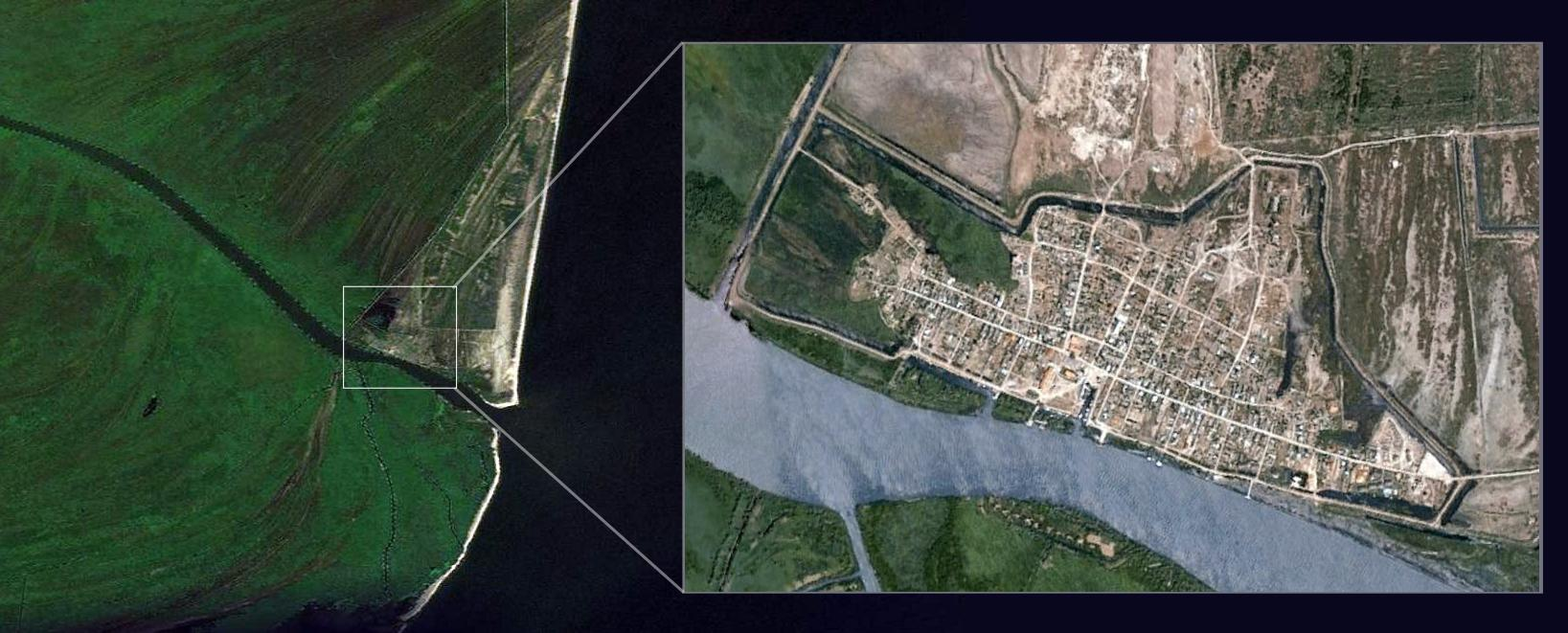 Sfantu Gheorghe (Tulcea) vazuta din spatiu.